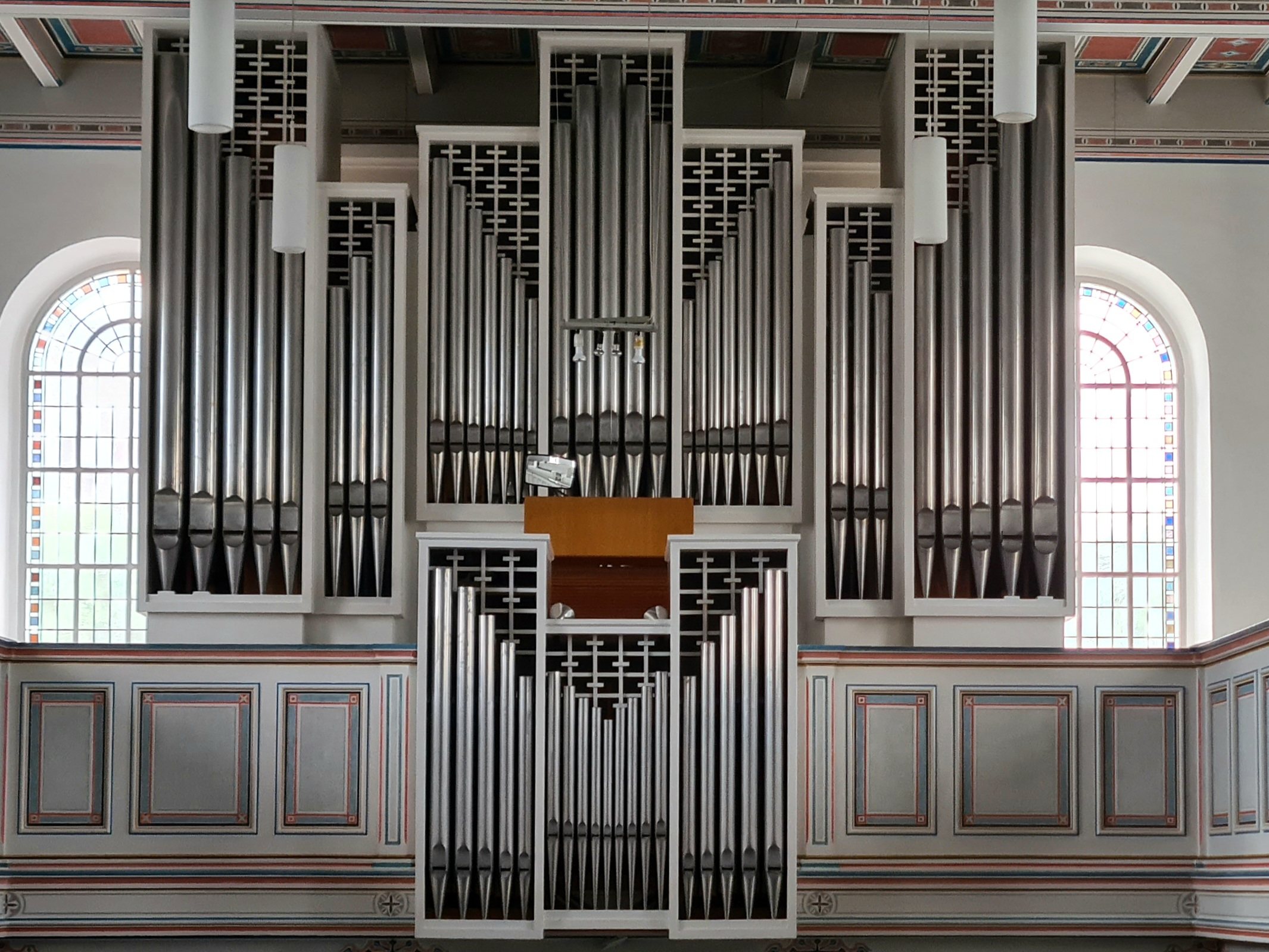 Das volle Prospekt der Orgel, der ev. Kirche in Drabenderhöhe